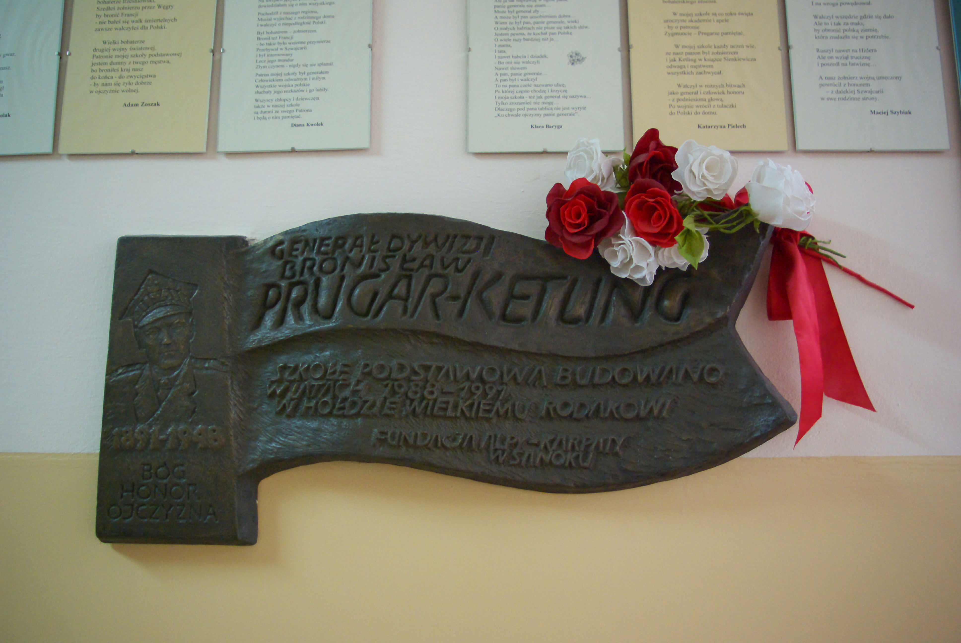 Tablica pamiątkowa w budynku Szkoły Podstawowej nr 1 im. gen. Bronisława Prugara - Ketlinga w Sanoku, upamiętniająca gen. Bronisława Prugara-Ketlinga.